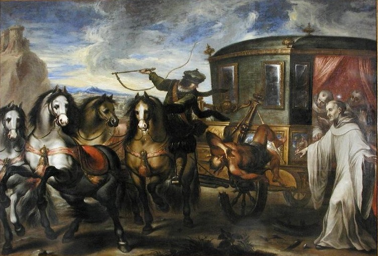 La obra representa un suceso que se situa en los Alpes, durante el viaje hecho por San Bernardo de Claraval al Concilio de Pisa, durante el pontificado de Inocencio II. El santo obliga al diablo a reparar la rueda dañada, para no demorar su llegada a Roma.